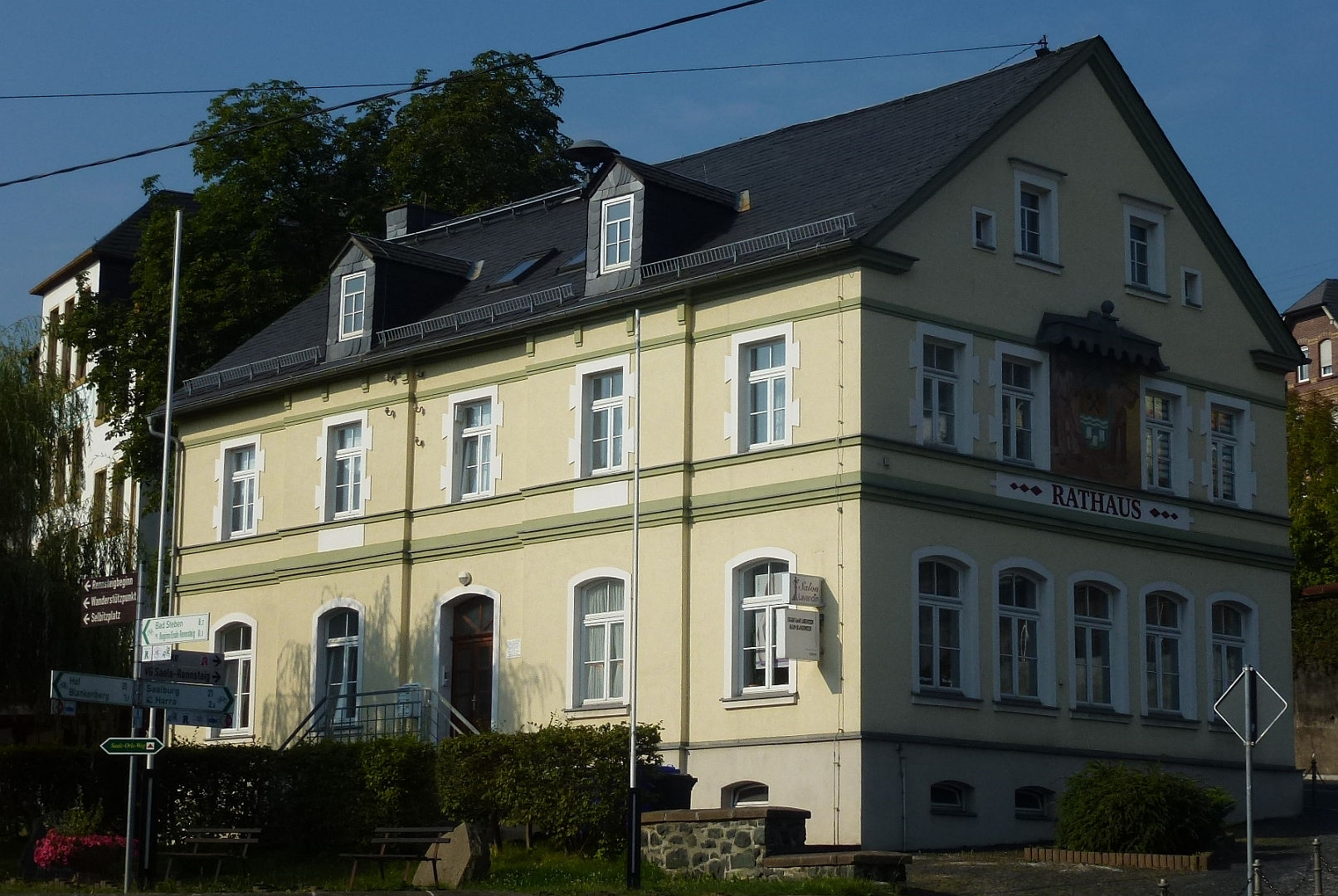 Rathaus in Blankenstein